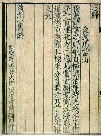 宋陳起編 宋嘉定至景定年間(1208-1264)臨安府陳解元宅書籍鋪遞刊本 為館藏最著名的孤本，宋刻宋印，精美無比。書中有「臨安府棚北大街陳宅書籍鋪」刻書牌記，此即世所艷稱的「書棚本」。書棚本刻書採用柳公權字體，間帶歐陽詢筆意，此種字體在明正德嘉靖年間(1506-1566)以後，為刻書者爭相倣效，而逐漸演變成橫輕直重，板滯不靈的匠體字，即今人所謂宋體。